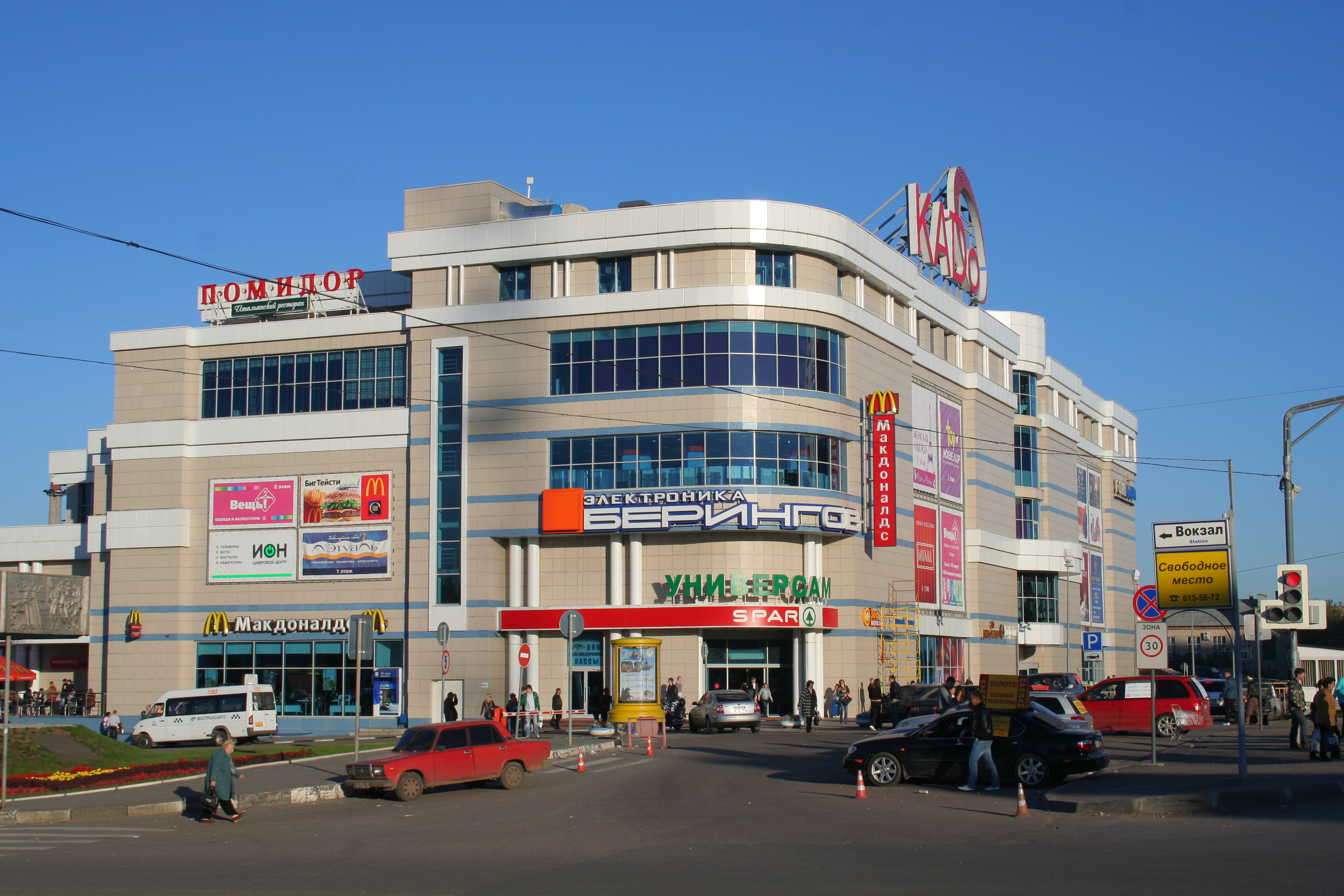 Centrum handlowe w Kołomnie (dzielnica Gołutwin)